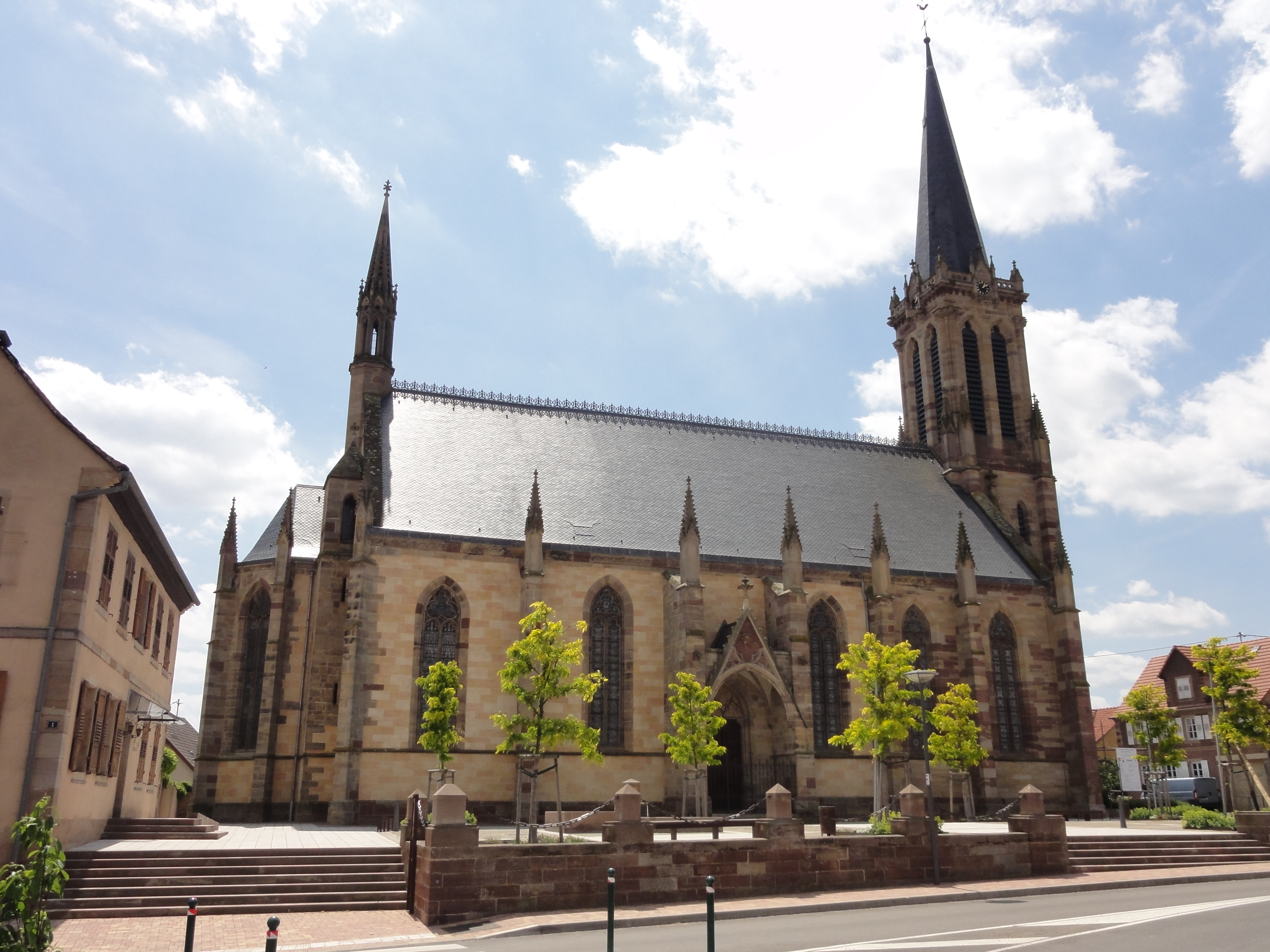 Alsace, Bas-Rhin, Westhoffen, Église protestante luthérienne Saint-Martin (PA00085223, IA67006260).